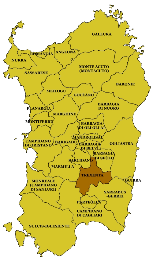 Sardinian Subregions